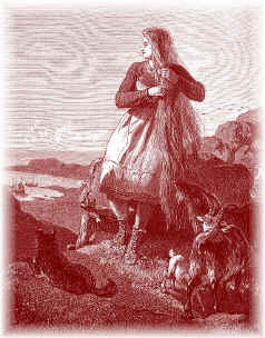 Skaði